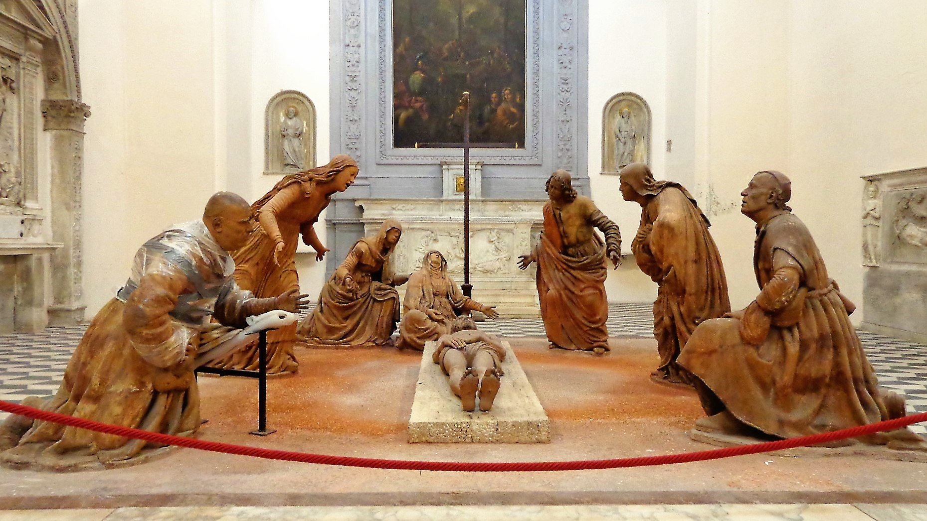 Compianto sul Cristo morto di Guido Mazzoni, gruppo scultoreo in terracotta, panoramica generale. Chiesa di Sant'Anna dei Lombardi, Oratorio del Santo Sacramento, Cappella del Compianto.